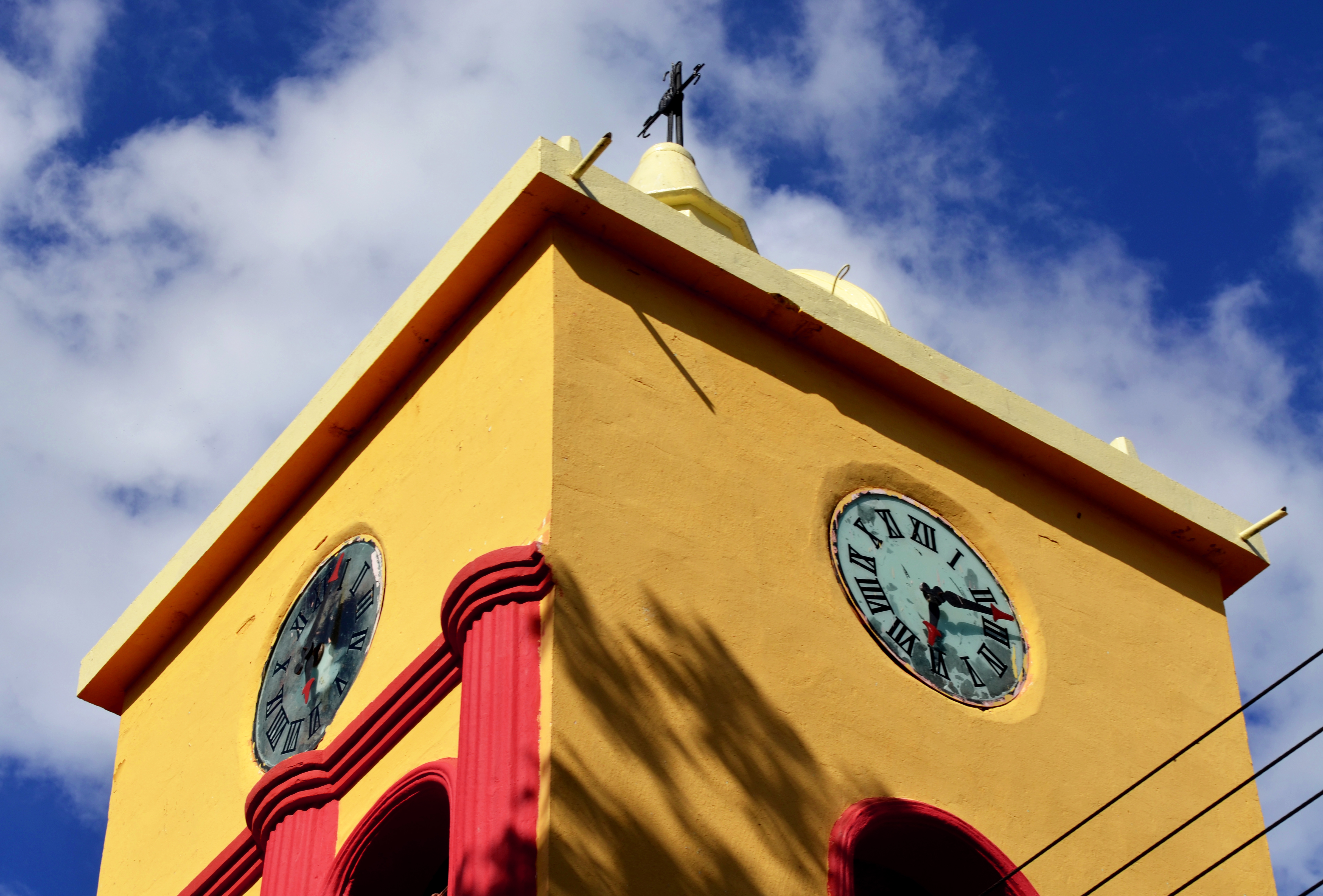 Campanario de la Iglesia Católica de Camaguán Estado Guárico "Humildad y Paciencia"